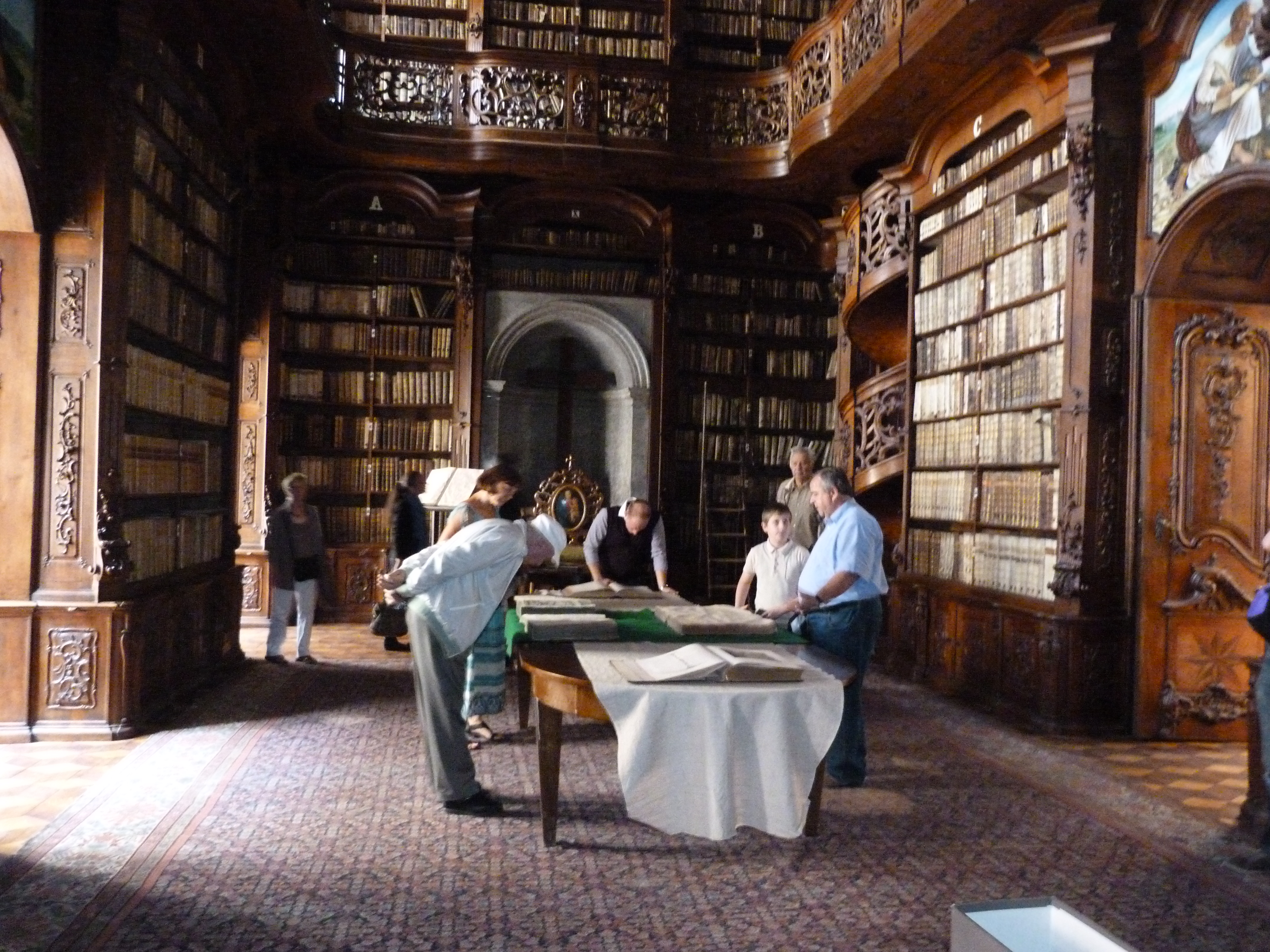 A felvételek 2012. Szeptember 16 –án vasárnap készültek Budapesten, a Pálos Könyvtárban. (Budapest V. ker. Papnövelde u. 7 szám. Dr. Diós István (győri egyházmegyés pap). ©© Published under Creative Commons in the METAPOLISZ DVD line (from Metapolisz CD ISBN 963-229-987-6 to Metapolisz 260 DVD ISBN 978-615-5011-14-6 and from that on without an ISBN number) ©© Megjelent Creative Commons alatt a METAPOLISZ sorozatban (Metapolisz CD ISBN: 963-229-987-6 -tól – Metapolisz 260 DVD ISBN 978-615-5011-14-6 -ig számozott, majd ISBN számozás nélküli sorozat). Published under Creative Commons in the Metapolisz DVD line. All of the photos and vids in the Metapolisz DVD line are under Creative Commons and can be used even for commercial – for profit – purposes. Recommended Citation Derzsi Elekes Andor: Metapolisz DVD line Megjelent Creative Commons alatt a Metapolisz sorozatban. A Metapolisz sorozat valamennyi képe és filmje Creative Commons alatti valamint kereskedelmi - for profit - célra is felhasználható. Ajánlott hivatkozás: Derzsi Elekes Andor: Metapolisz DVD line